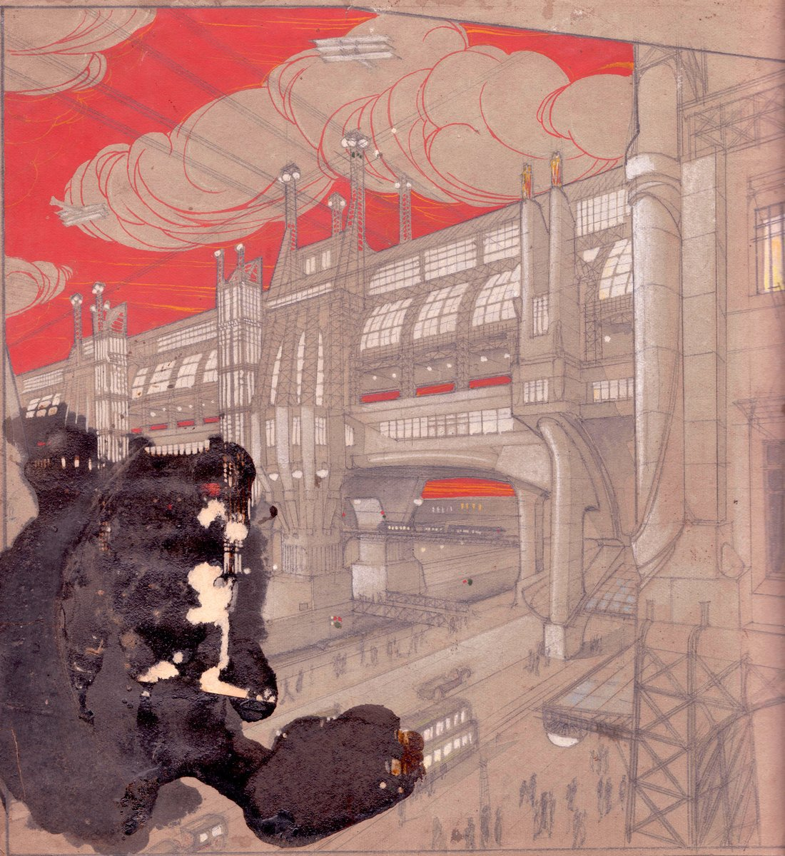 Disegno su carta di Mirko Vucetich. "La città nuova".